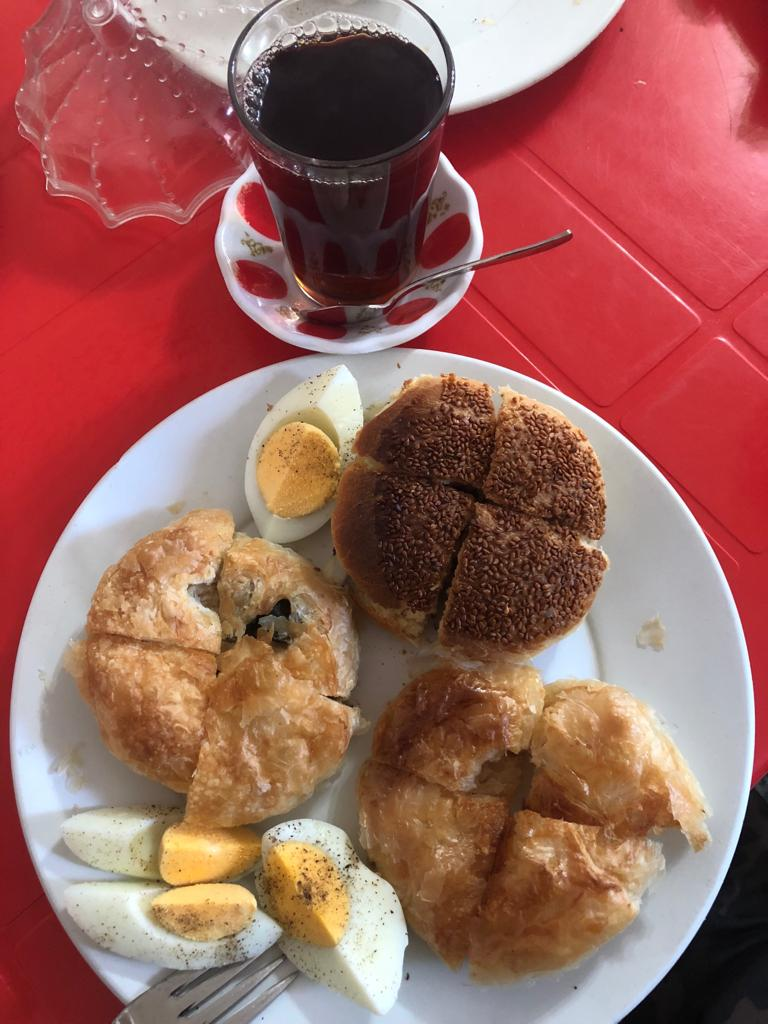 الإفطار الشعبي في إزمير في تركيا